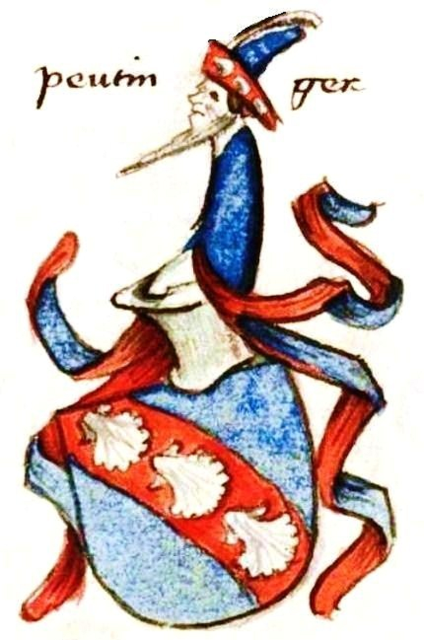 Wappen der Peutinger, Augsburger Kaufmanns- und Patrizierfamilie; 1364 bis ins 18. Jahrhundert in Augsburg nachweisbar; Herrenstube (Wappenzyklus 1457); 1538 Aufnahme ins Patriziat.